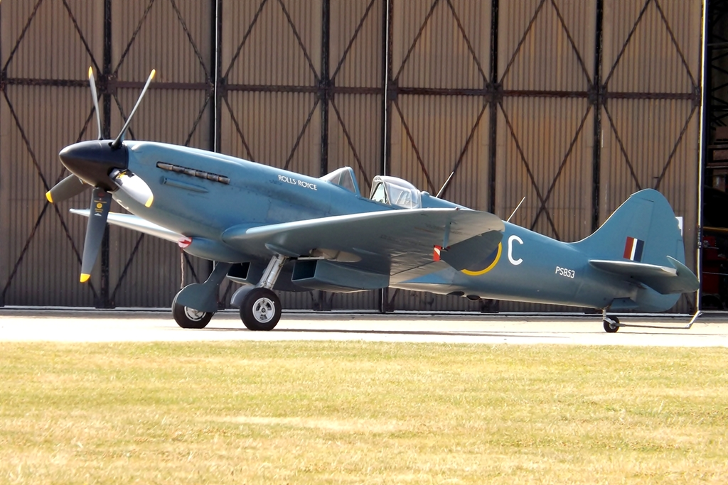 PS853/C Supermarine Spitfire Mk PR.XIX (G-RRGN)